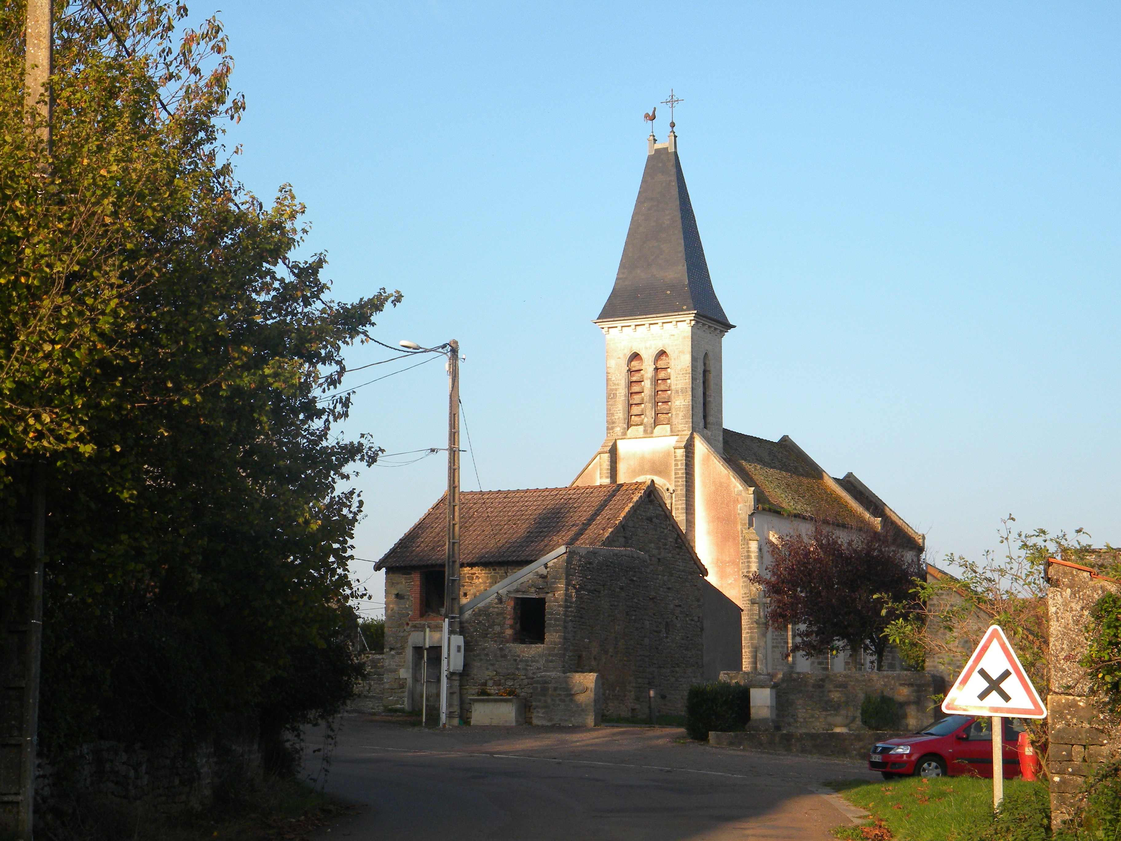 Preĝejo